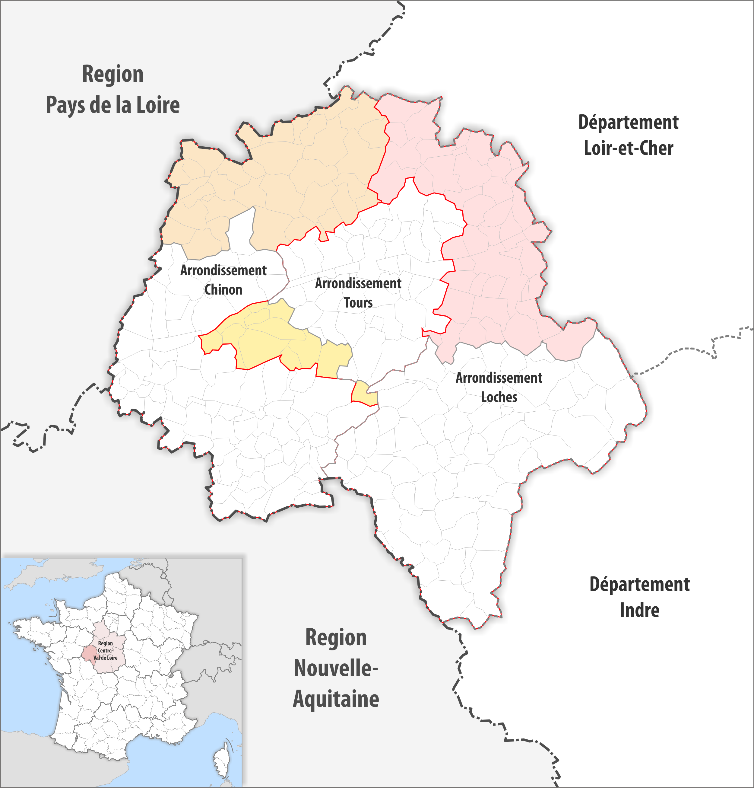 Arrondissements Anpassungen auf 2017 im Departement Indre-et-Loire